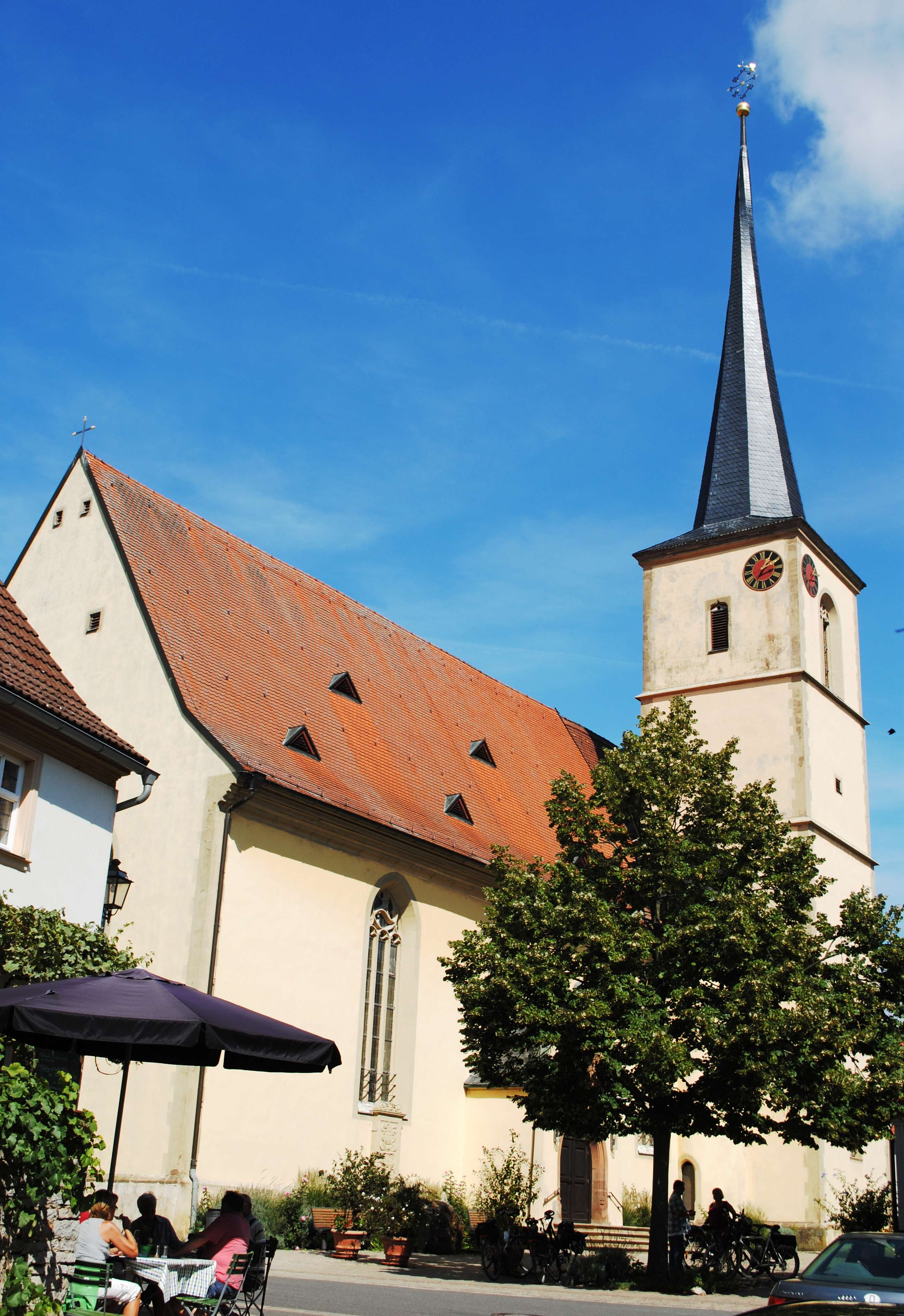 Kirche, St. Eucharius, SommerachThis is a photograph of an architectural monument.